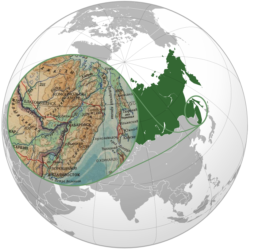 Хребет Сихотэ-Алинь.